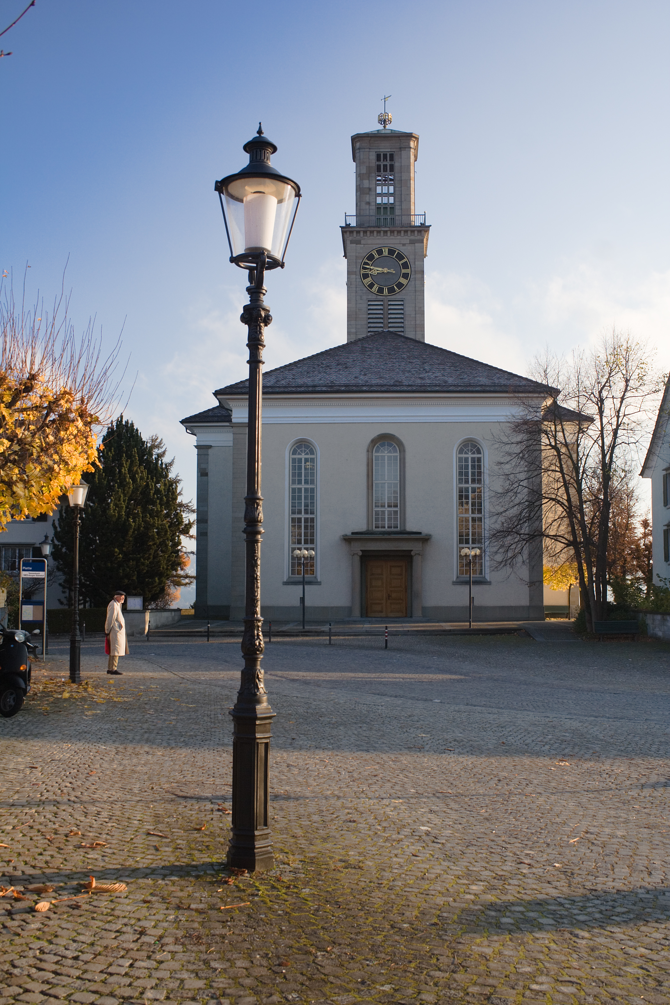 Reformierte Kirche Thalwil, SchweizArchitekten Matthias Wieland und Schmied, Änderungsvorschläge von Ferdinand Stadler